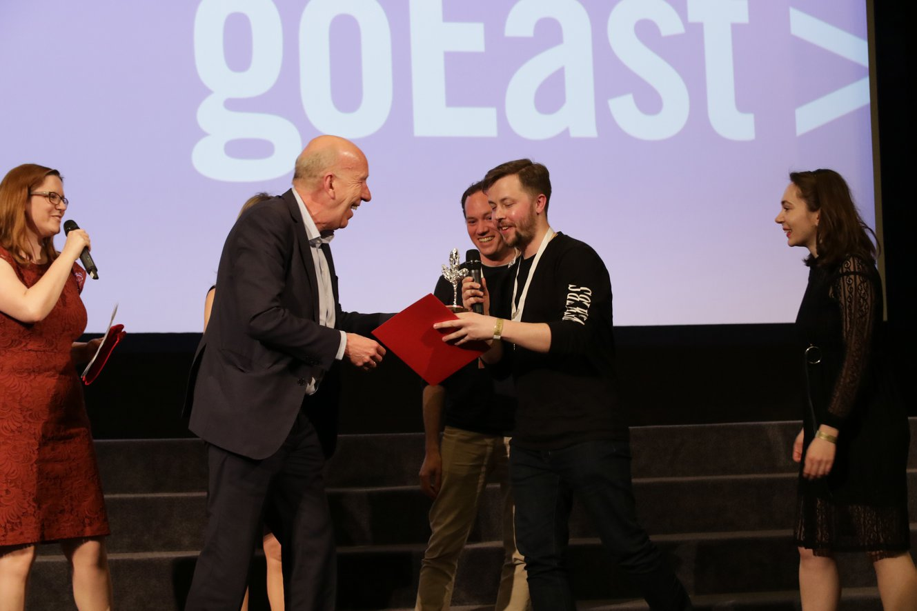 Денис Семенов получает награду Open Frame Award 2018 в Висбадене